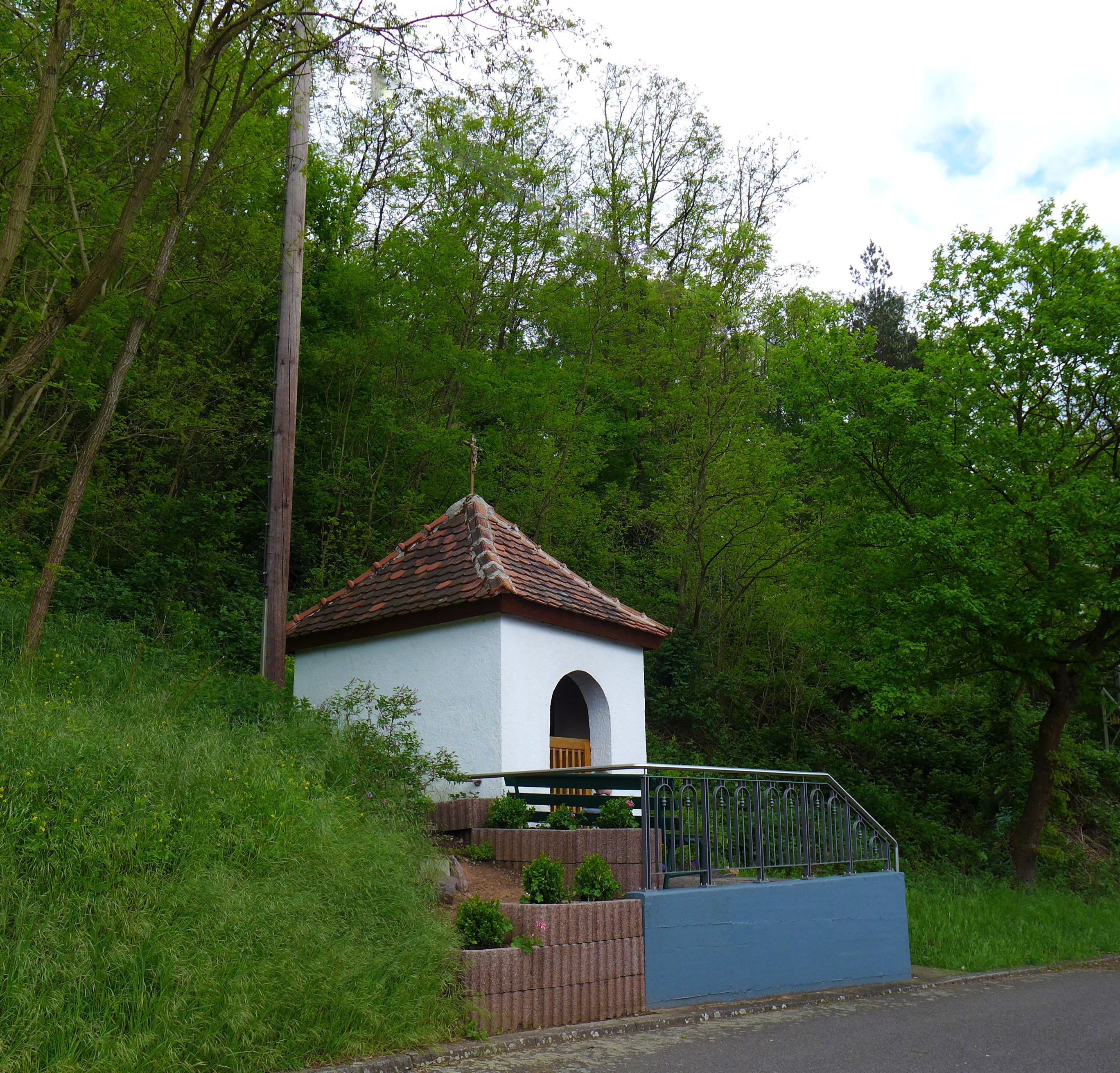 Nalbach, Josefskapelle am Nalbacher Galgenberg